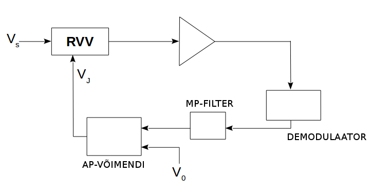 AVR-i süsteemi plokkskeem